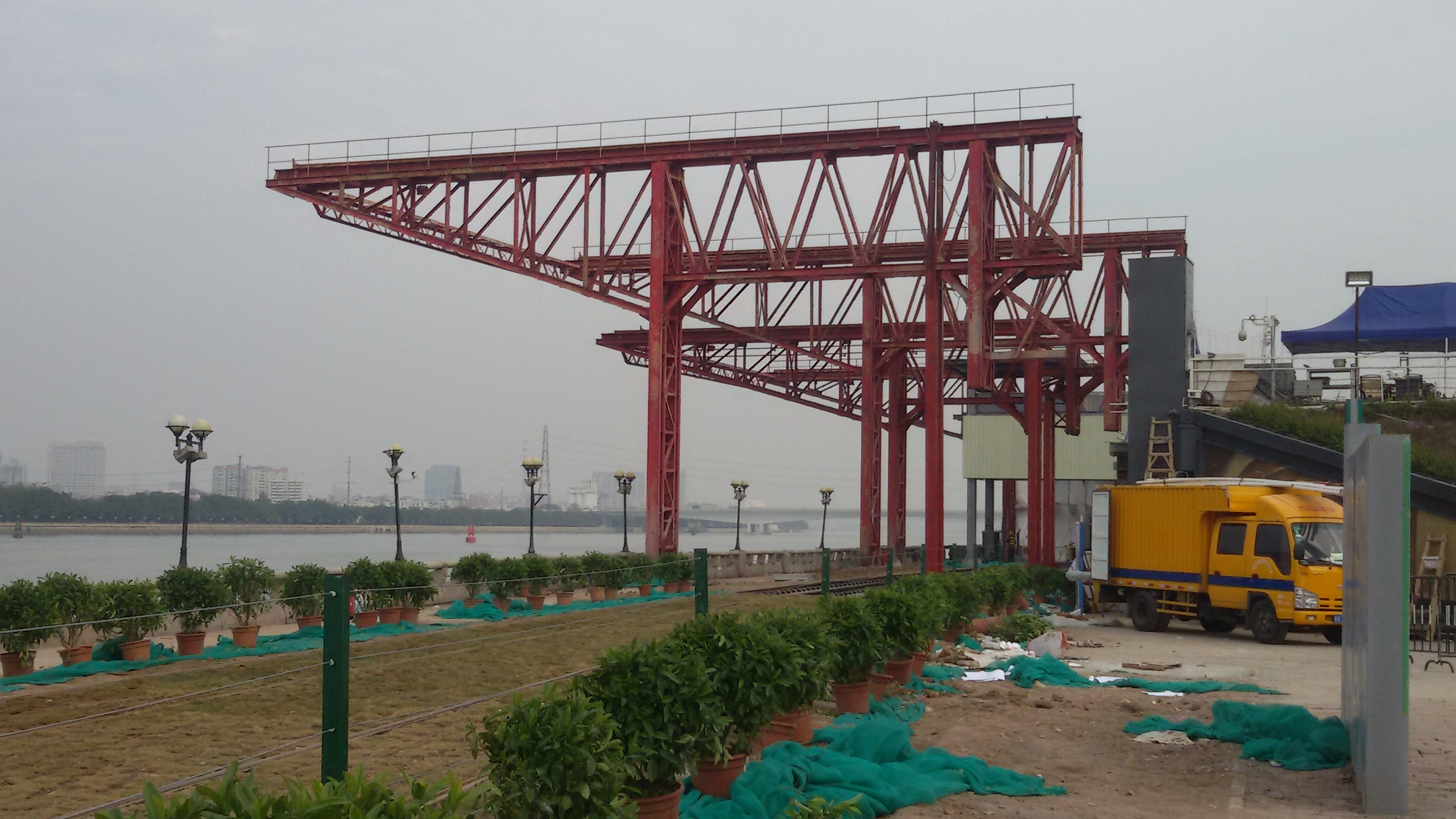 粵語: 琶醍站（施工嗰時，2015年1月9號）